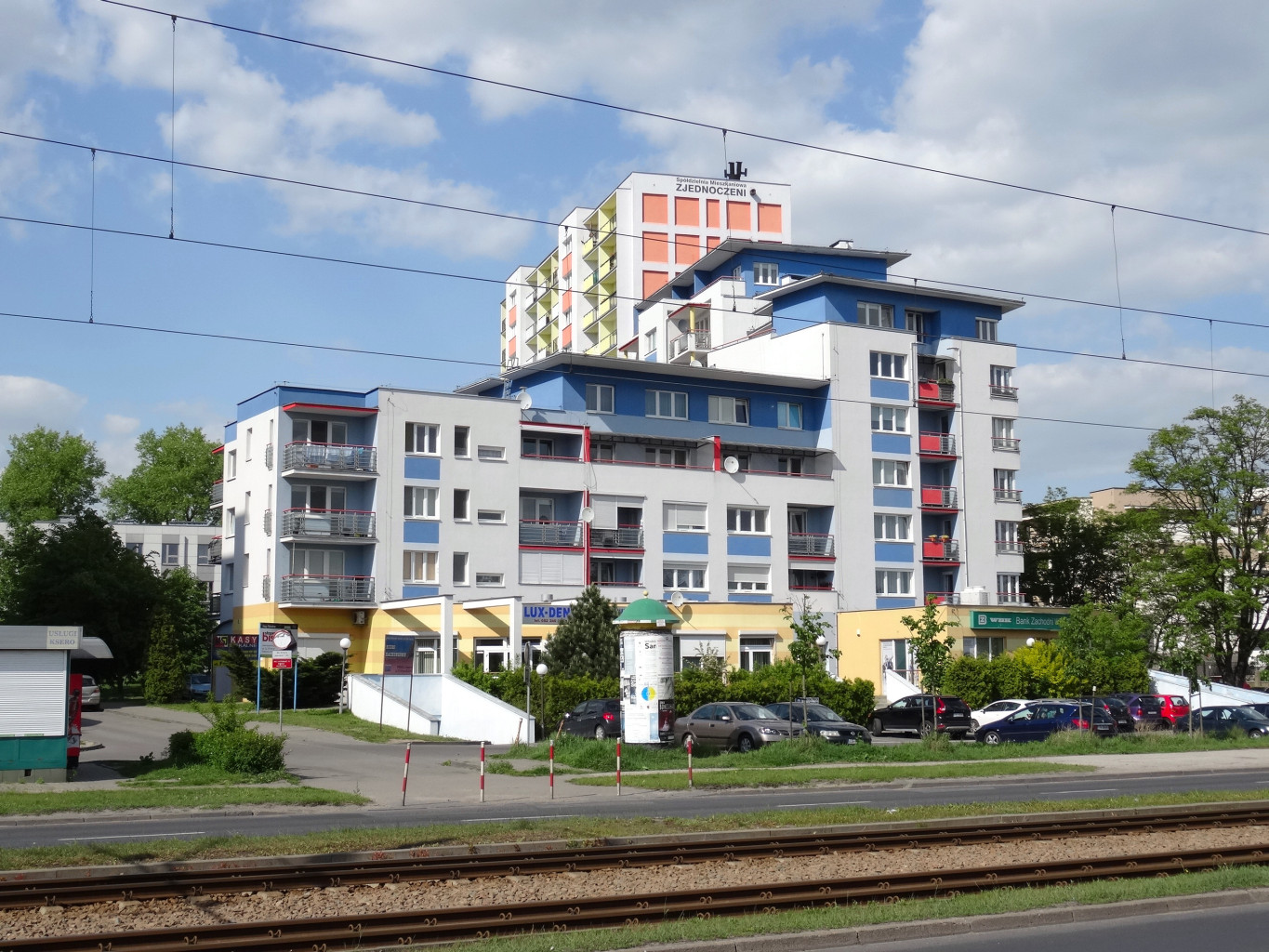 Osiedle Bartodzieje w Bydgoszczy